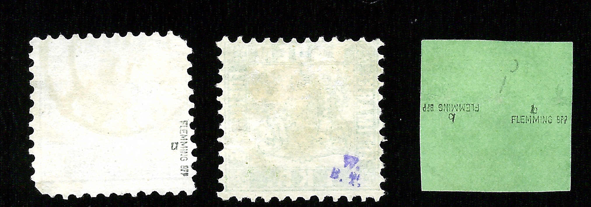 Erstellt von Martin Dürrschnabel Prüfzeichen von Briefmarken.